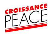 Logo de l'ONG Croissance PEACE